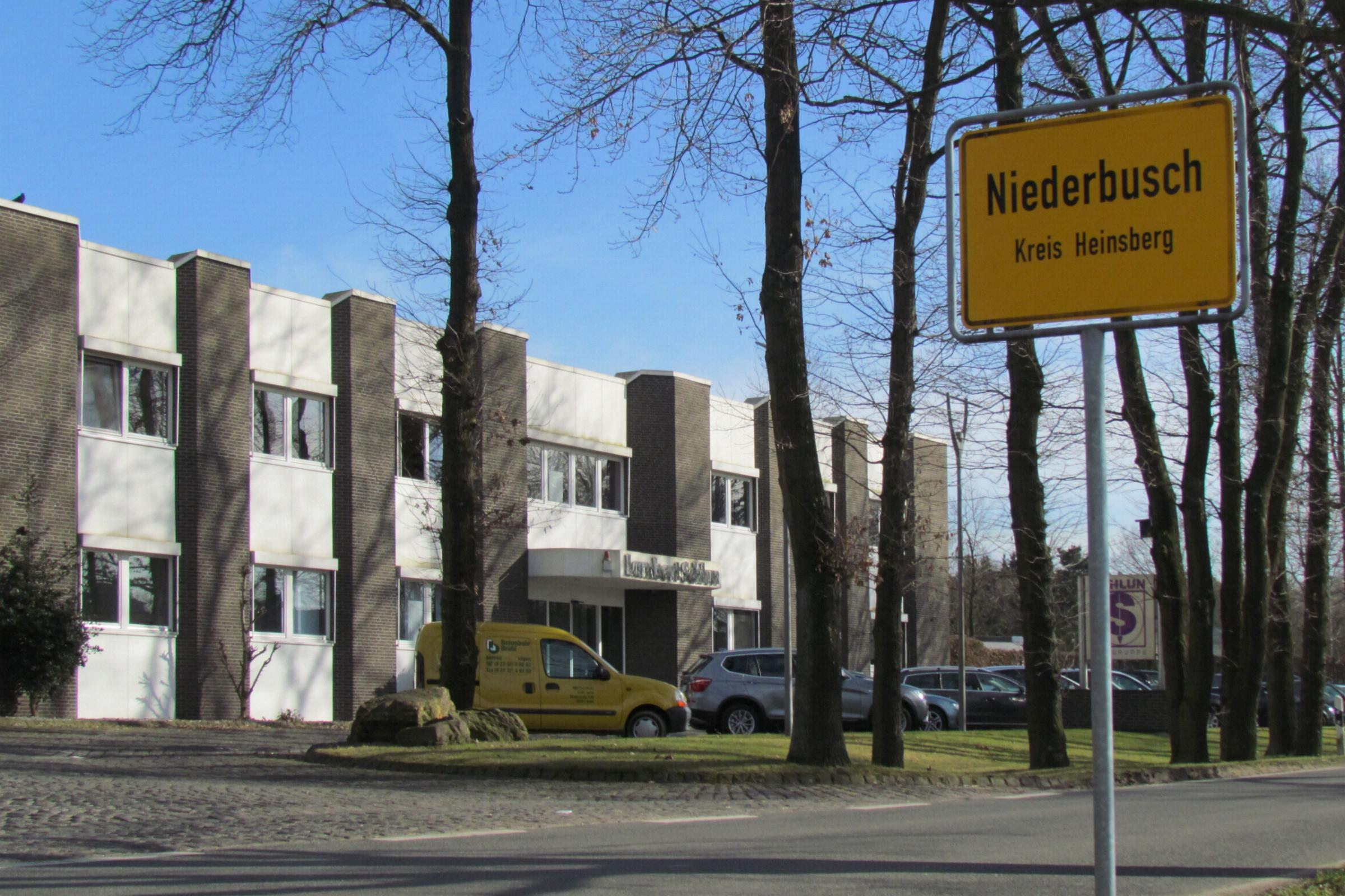 Ortseingang in Niederbusch